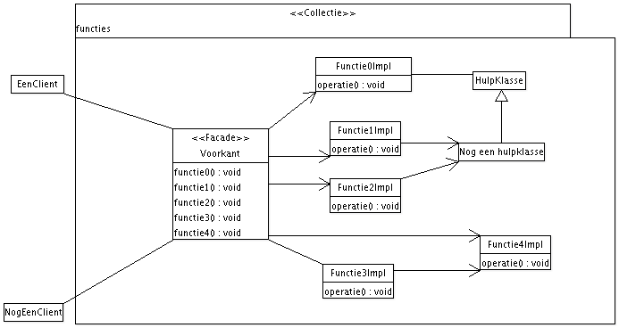 Diagram van het façadepatroon. Door uploader gemaakt. Geen eigenwerk -sjabloon, daar staat GFDL-rotzooi in.